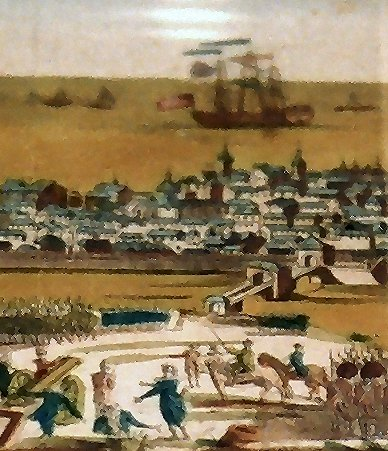 Artillerie française installée sur la colline de Carabacel (1698 ou 1704)